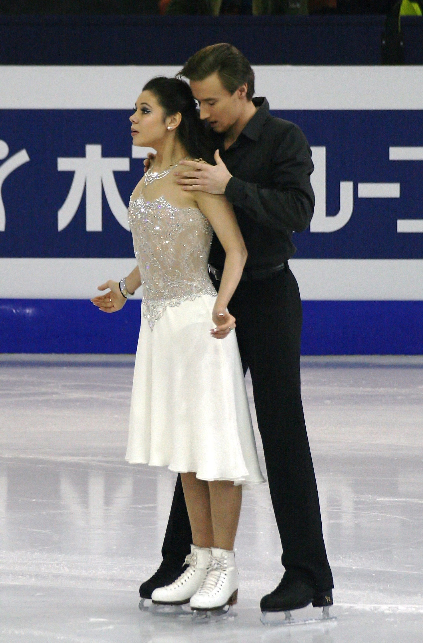 Елена Ильиных и Руслан Жиганшин (Россия) на финале Гран-при по фигурному катанию 2014-2015.